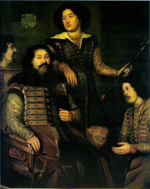 Групповой портрет участников русского посольства 1662 г. в Англию. Неизвестный английский художник. X., м. 1662. князь Прозоровский Пётр Семёнович Давыдов Иван (дьяк) Желябужский Иван Афанасьевич Форот Андрей (переводчик)